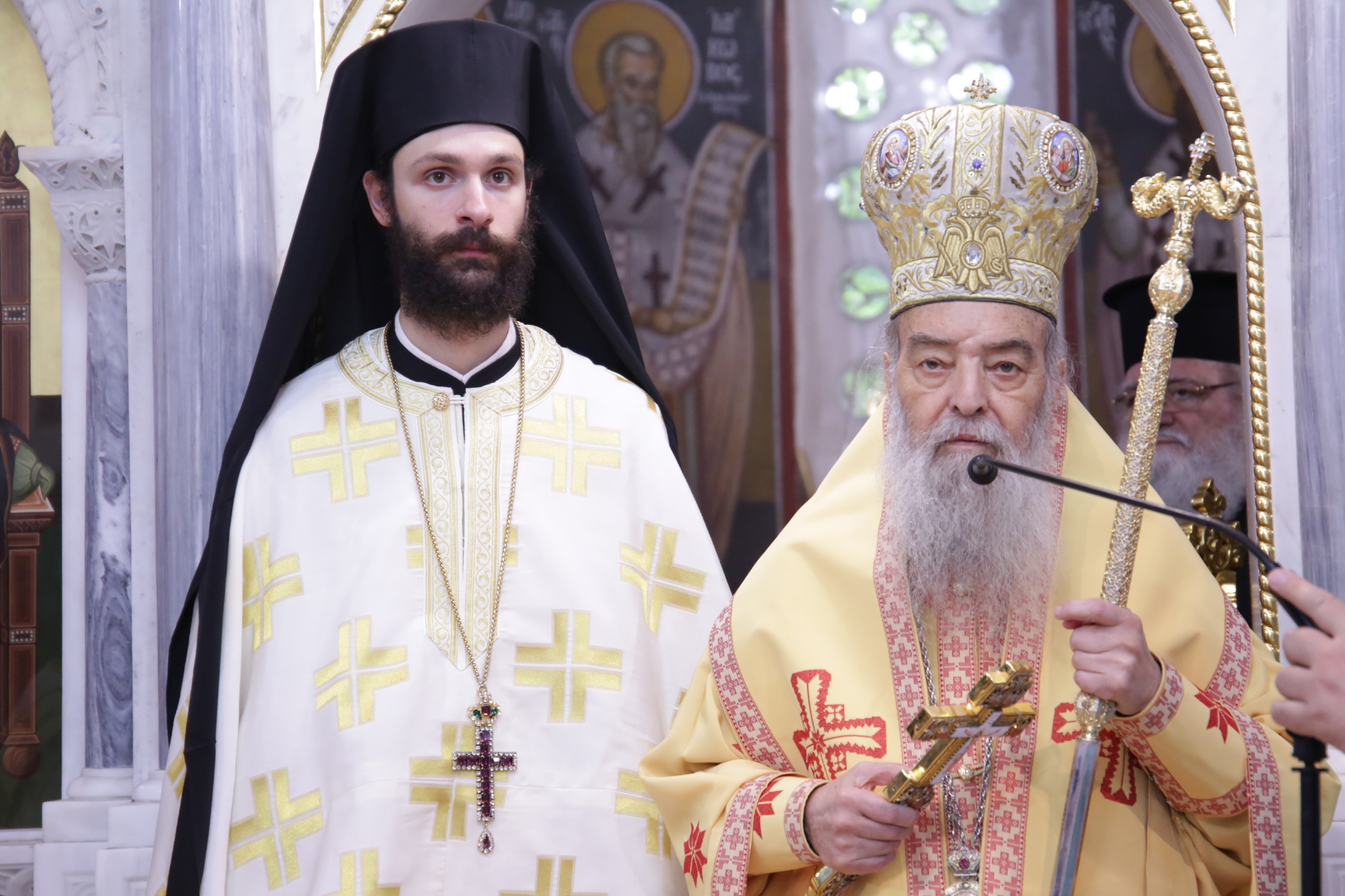 Ο Μητροπολίτης Γόρτυνος και Μεγαλοπόλεως Ιερεμίας κατά την χειροτονία Αρχιμανδρίτη